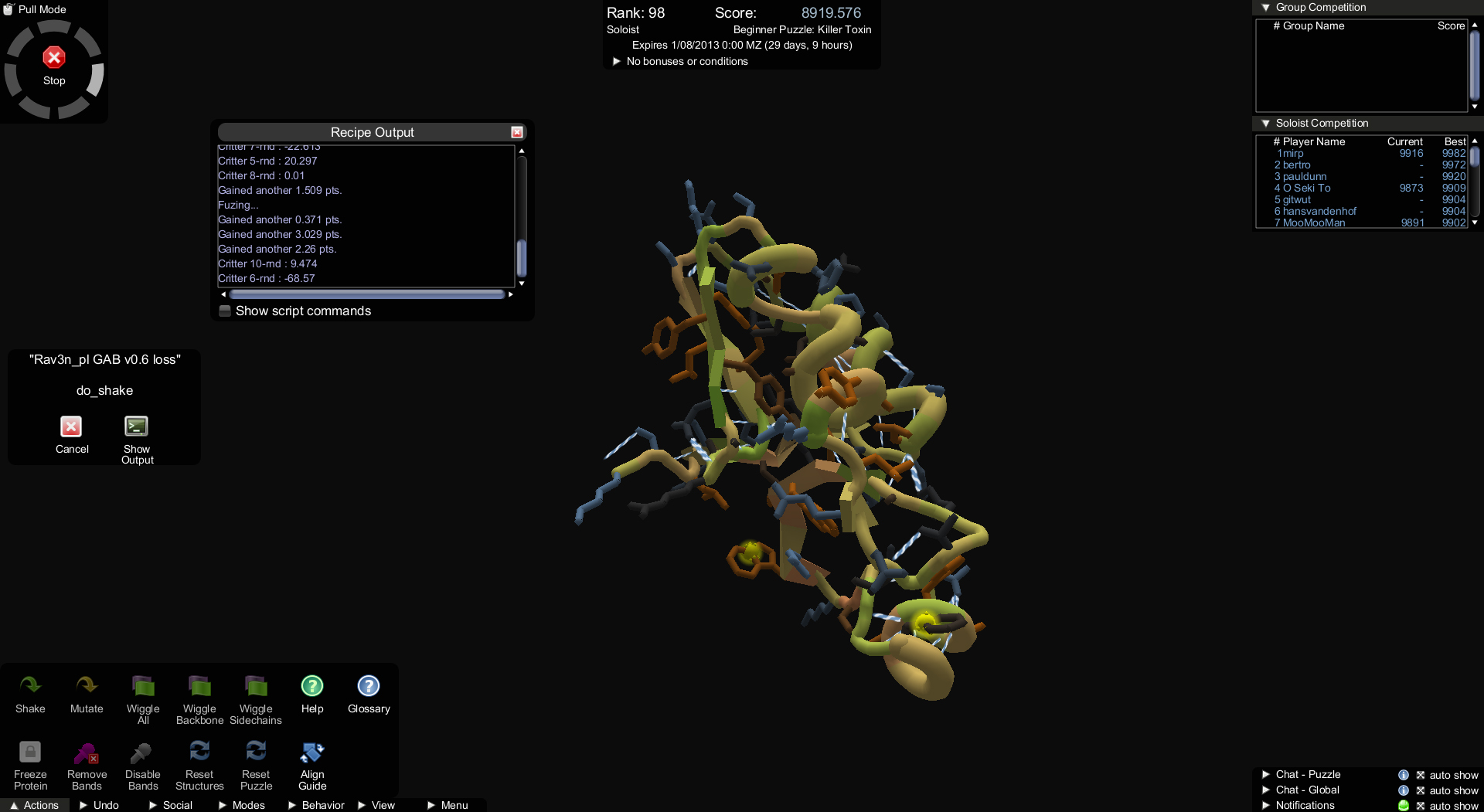 Screenshot von Foldit